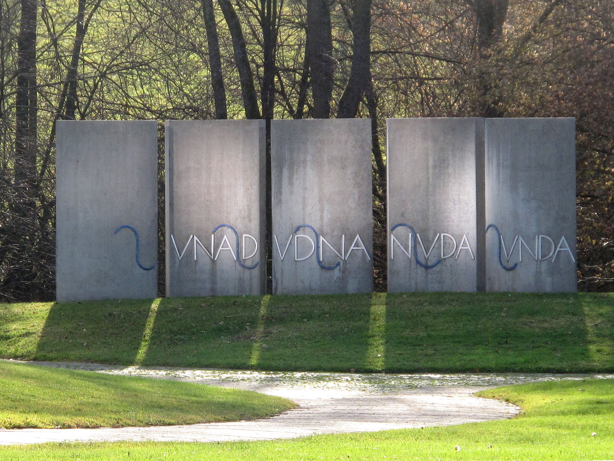 Ian Hamilton Finlay, Konkrete Poesie, Station III: „VNDA“, 1975, - Deutschland, Stuttgart-Vaihingen (Büsnau), Garten des Max-Planck-Instituts für Festkörperforschung - (Station VI: im Innenraum eines Gebäudes, Station VII: nicht mehr existent)